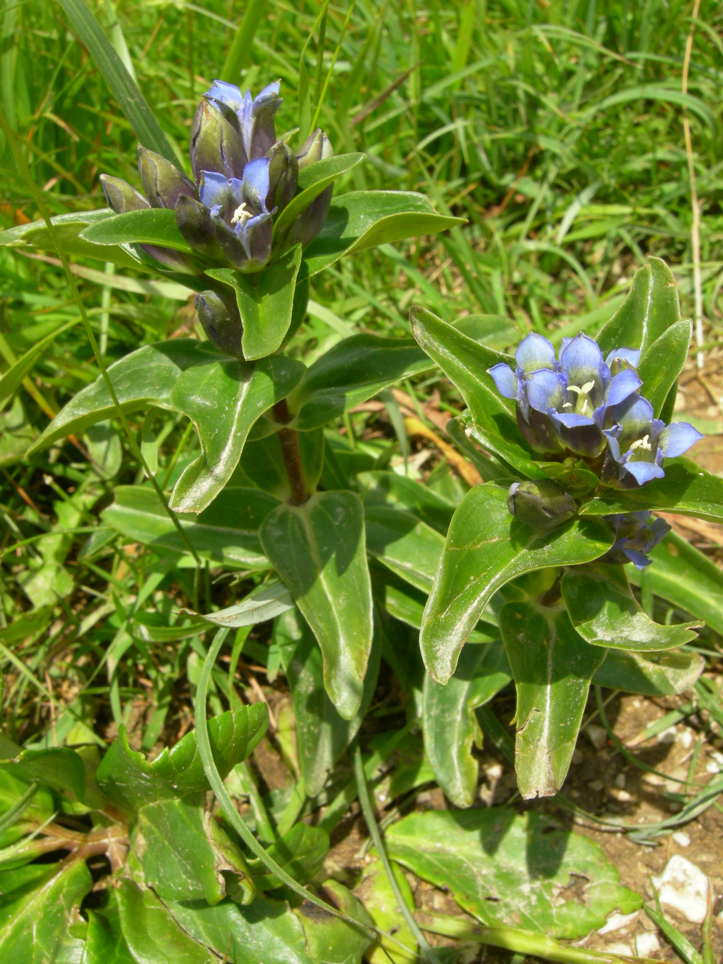 Gentiana cruciata, planina Uskovnica, Slovenija